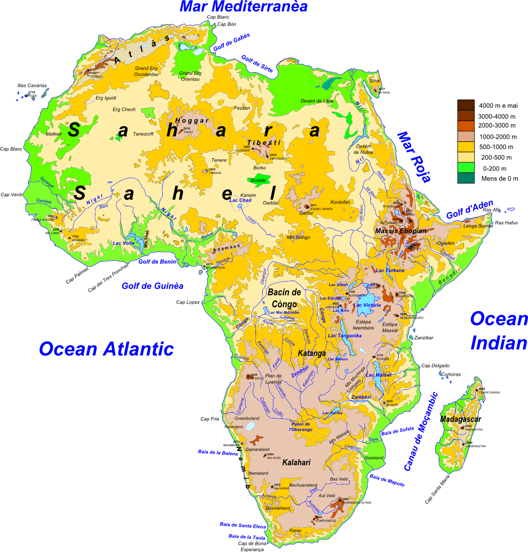 Topografia dau continent african.